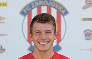 Milan Lutonský (2015)